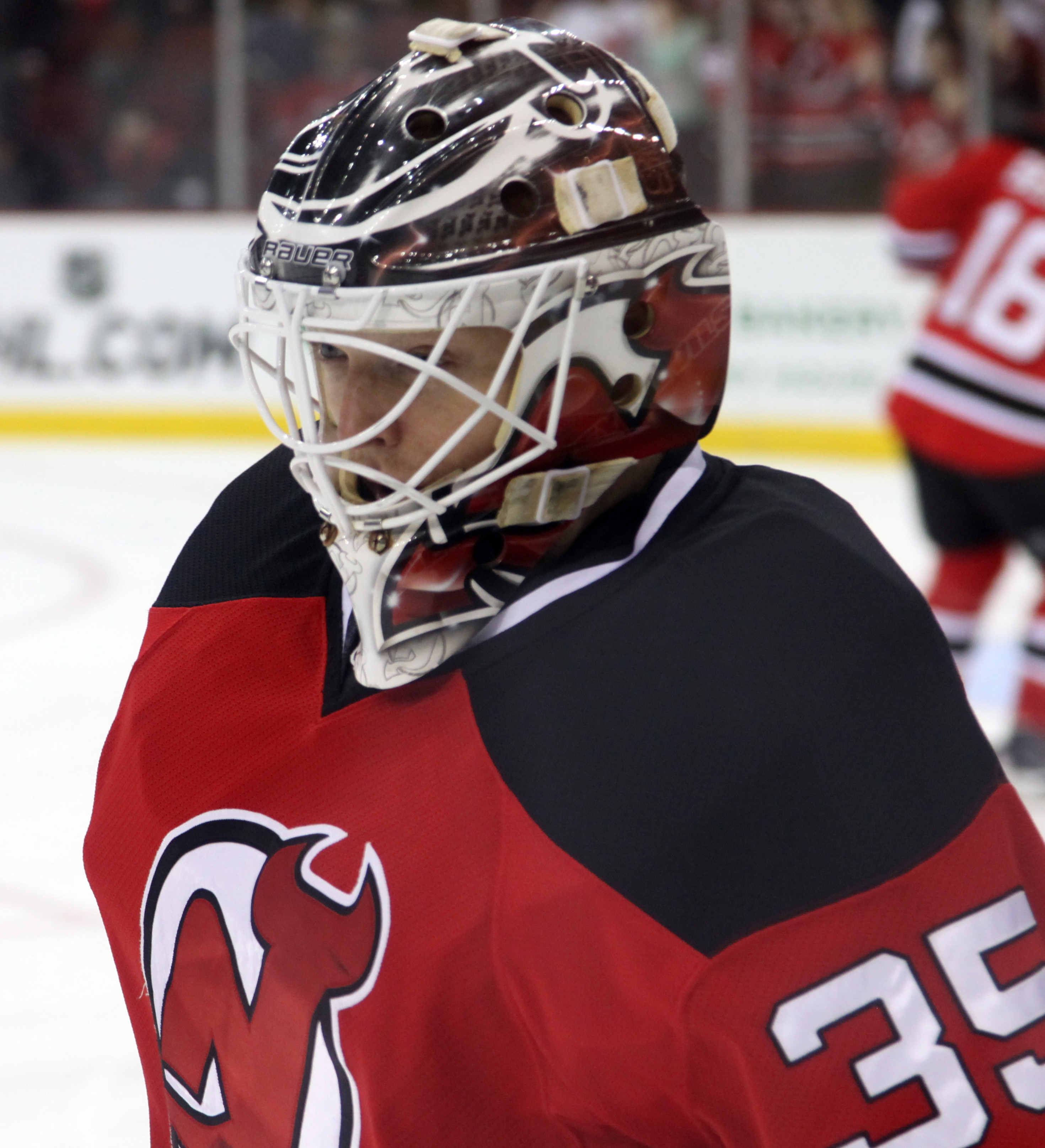 Schneider in 2014.